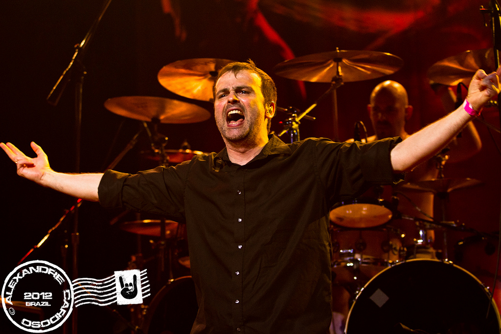 A banda Blind Guardian ao vivo no Credicard Hall - 23/04/2012 - São Paulo, Brasil